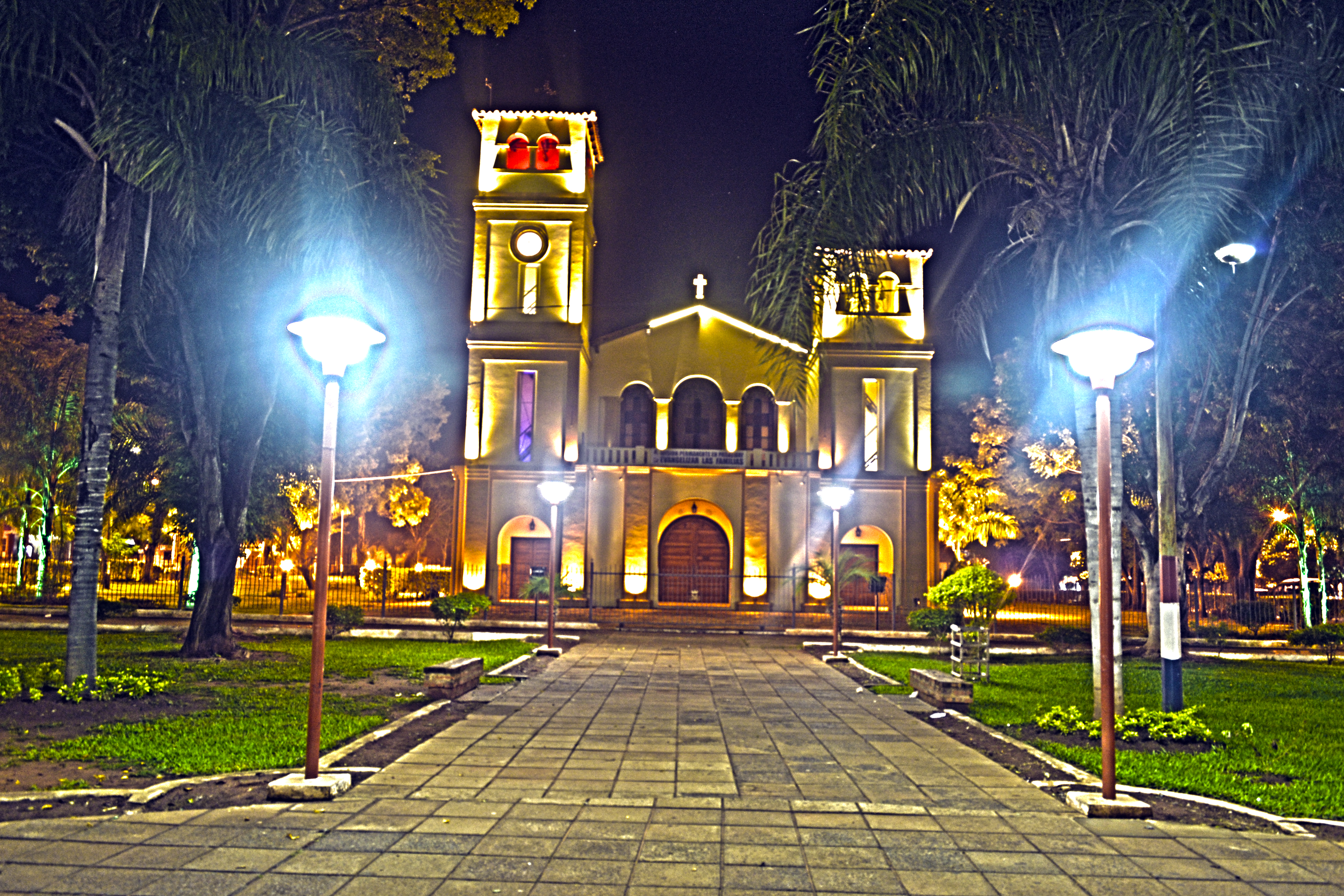 Fotografia de alto rango dinamico de la plaza Emiliano R Fernandez y de fondo la Iglesia